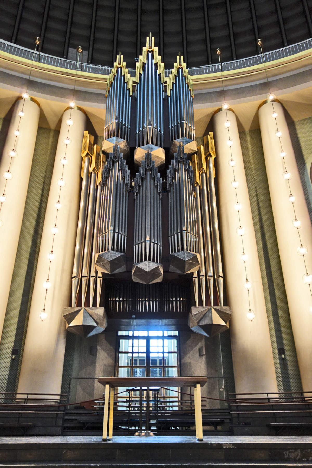 Orgel der Hedwigskathedrale in Berlin